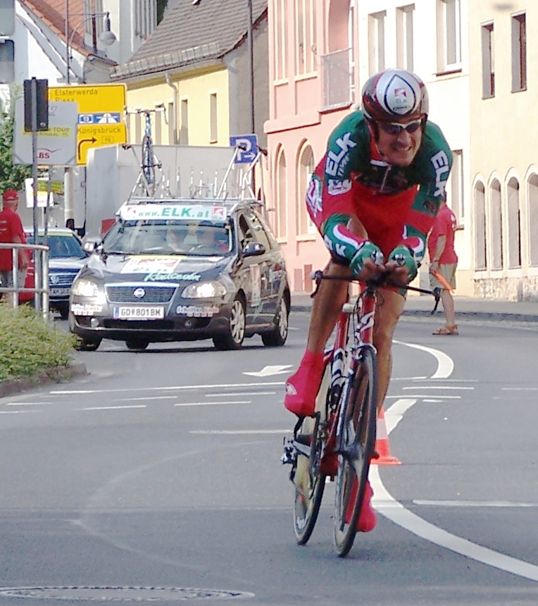 Die Aufnahme entstand beim Einzelzeitfahren der Sachsen-Tour 2008 in Großenhain